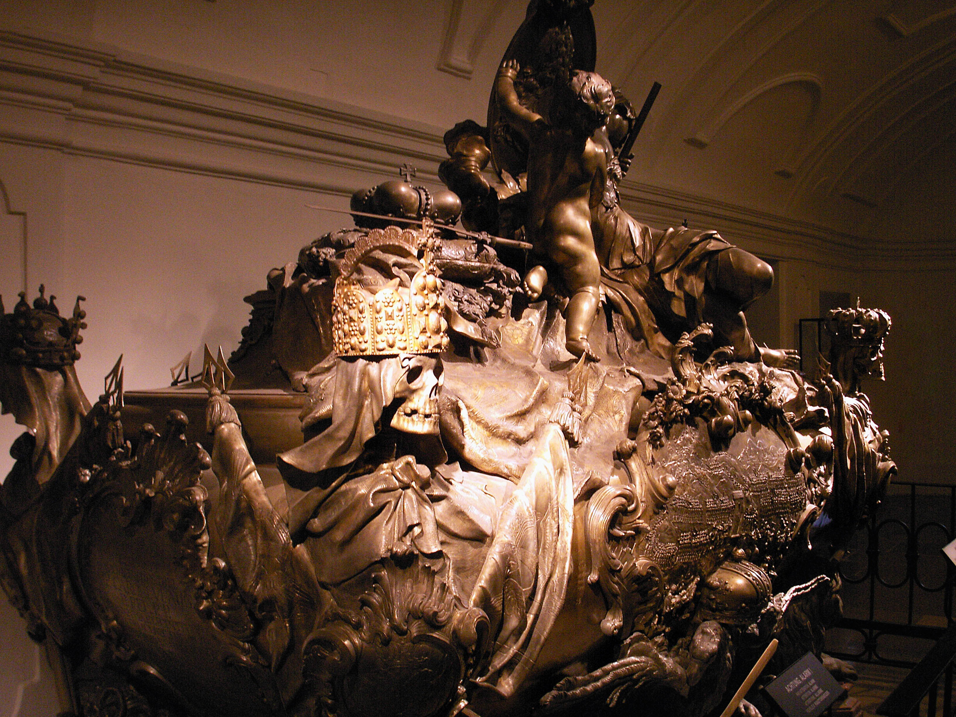 Kapuzinergruft, Wien, Sarkophag Kaiser Karl VI.